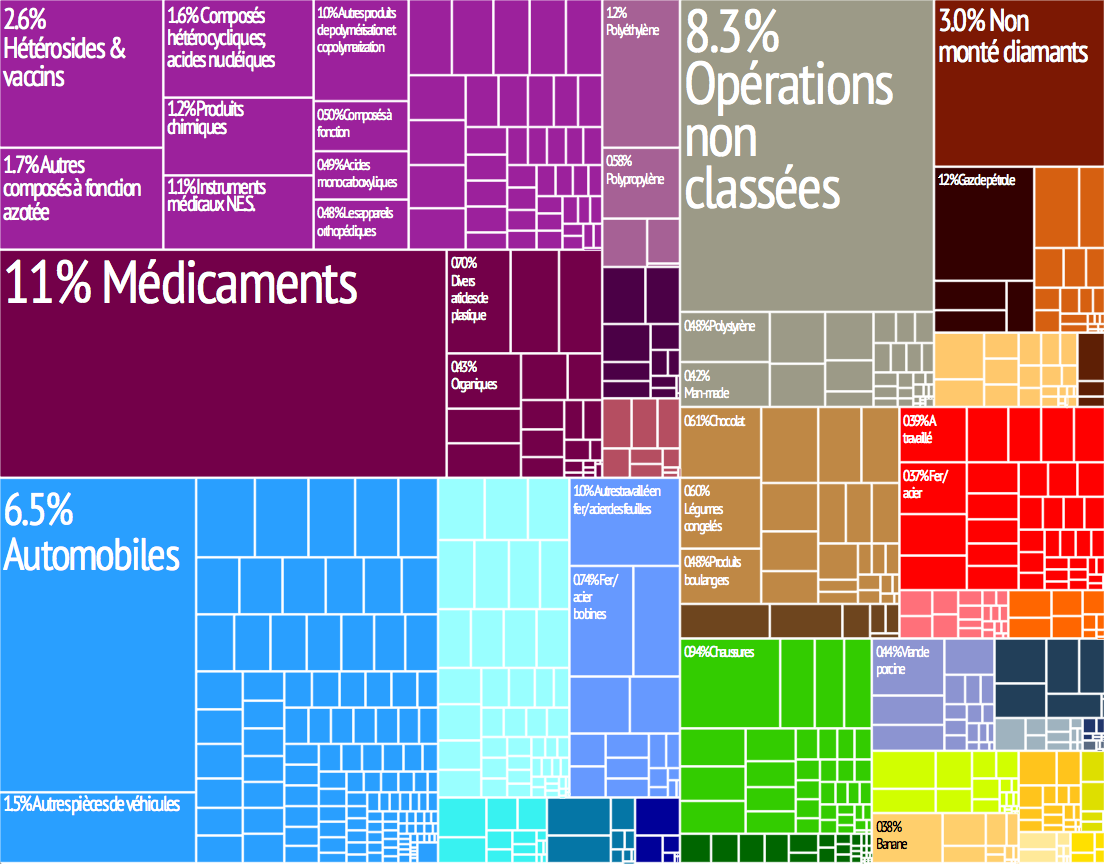 Carte proportionnelle des exportations de produits du pays dans 28 catégories de couleur. Chaque case de couleur représente un produit et sa taille est proportionnelle à la part des exportations totales du pays que le produit représente.